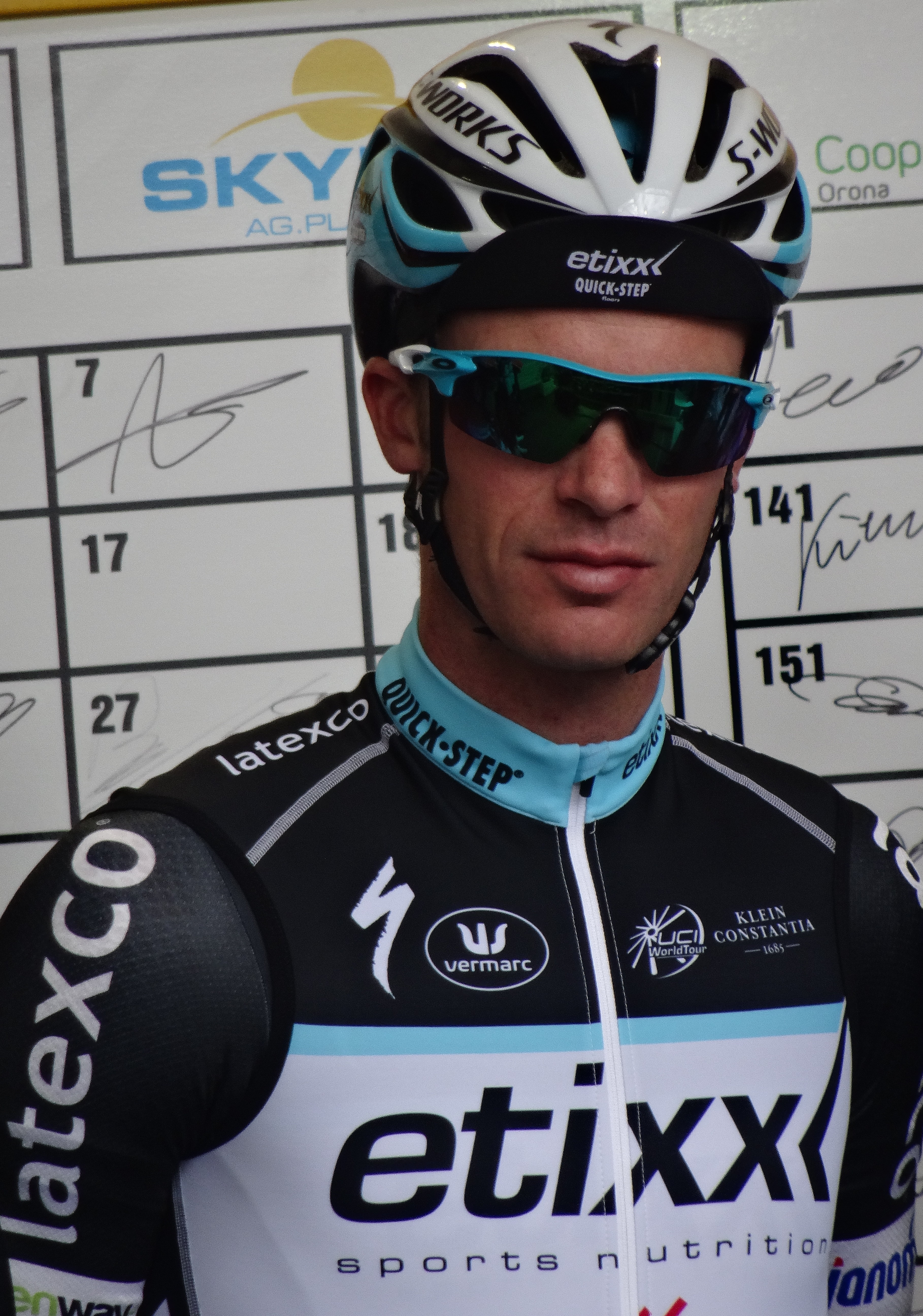 Reportage réalisé le dimanche 1er mars à l'occasion du départ et de l'arrivée de Kuurne-Bruxelles-Kuurne 2015 à Kuurne, Belgique.